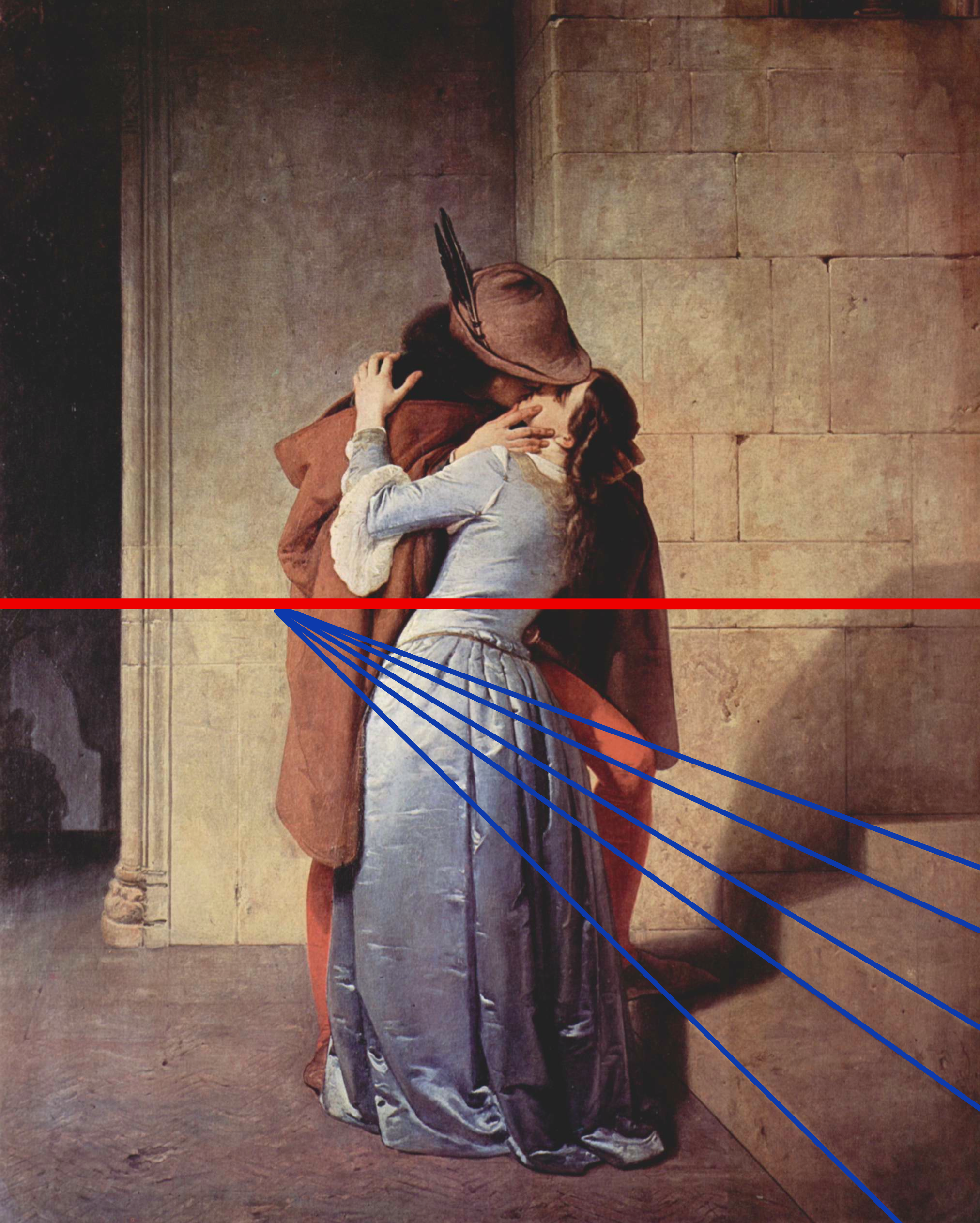 Linee prospettiche de Il bacio, di Francesco Hayez.